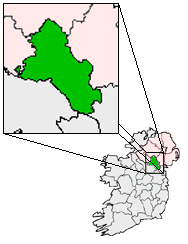 Map of Mnaghan